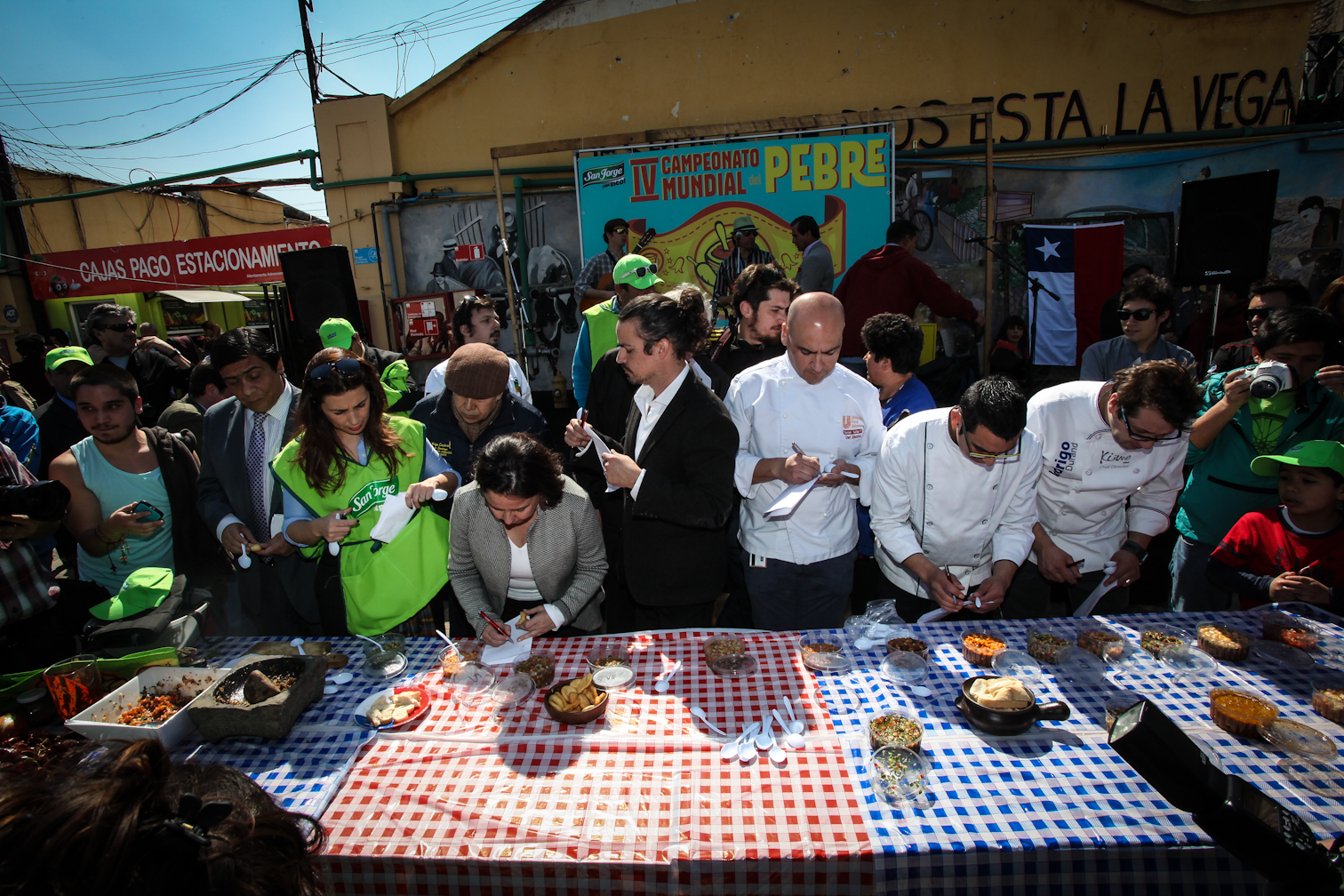 IV Campeonato Mundial del Pebre Guachacas - Vega Central